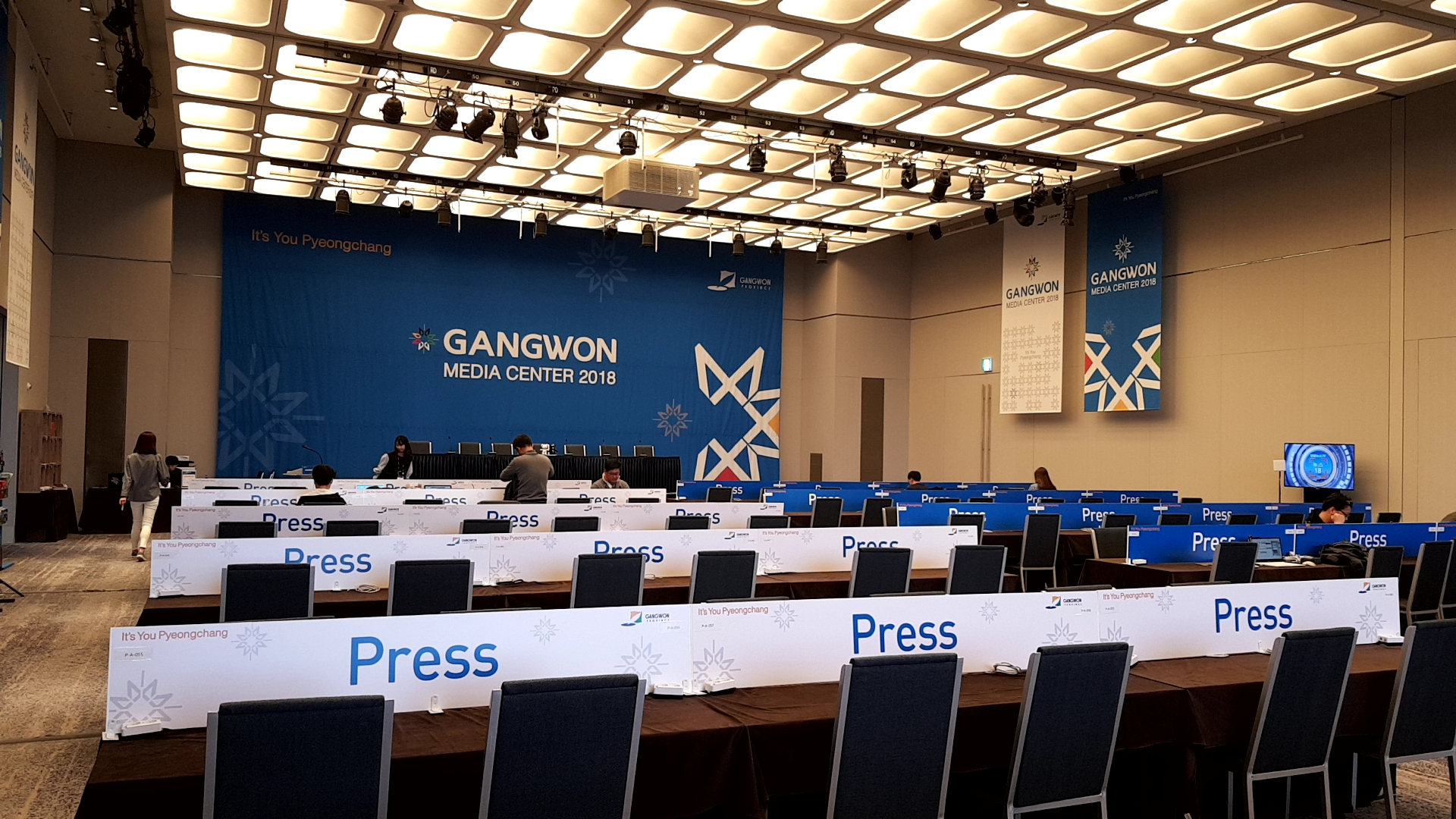 올림픽 및 패럴림픽 기간동안 강릉 씨마크호텔 내부에 설치되었던 강원 미디어센터.